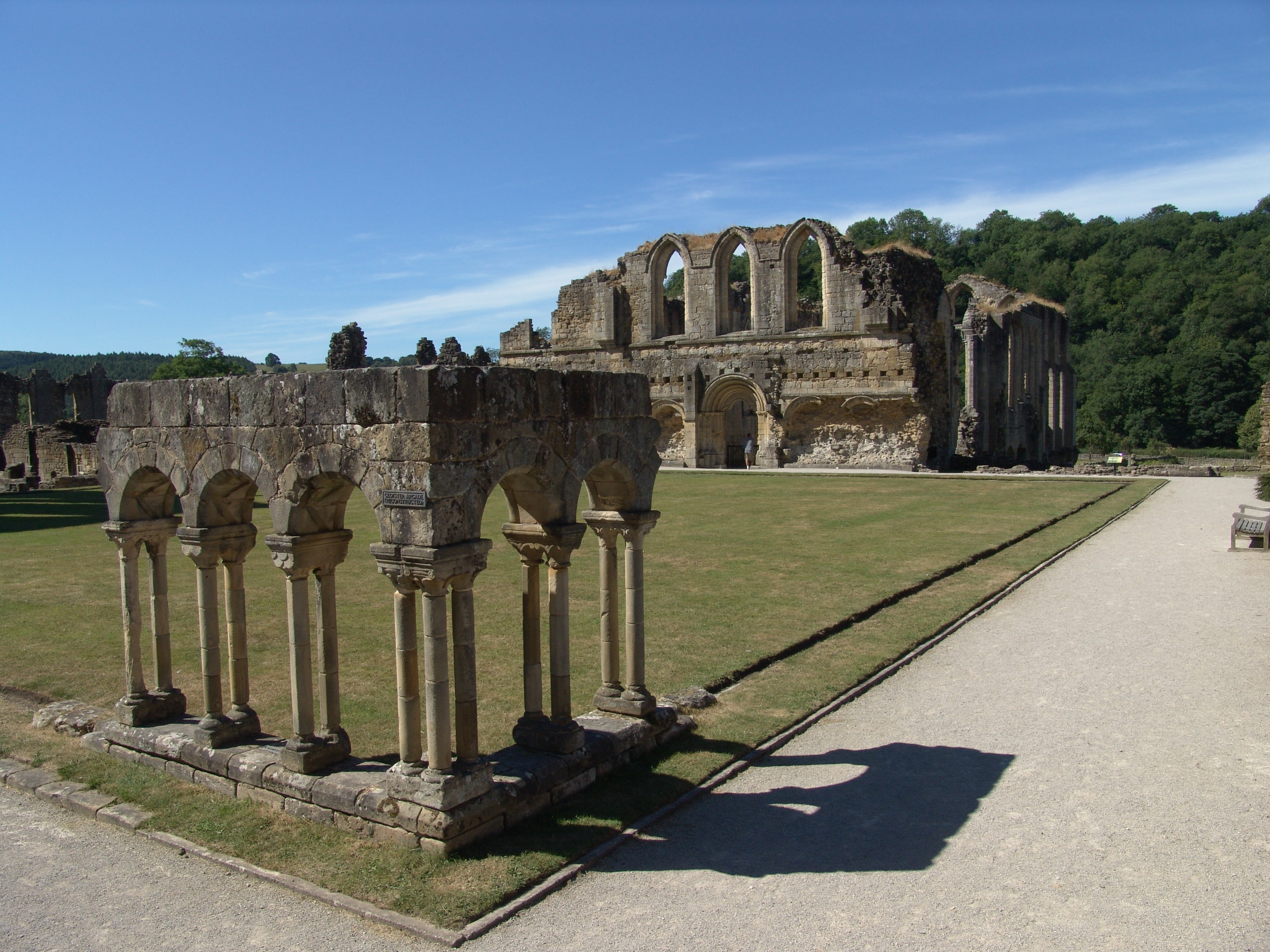 Rievaulx Abbey